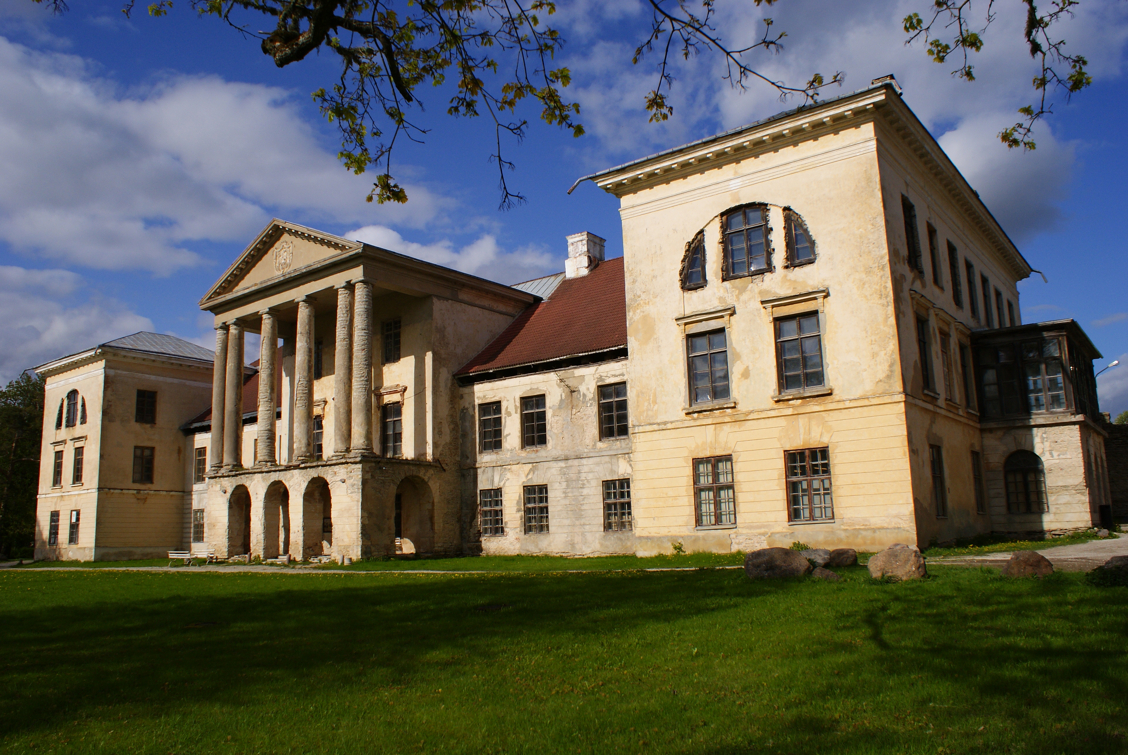 Kolga mõisa peahoone